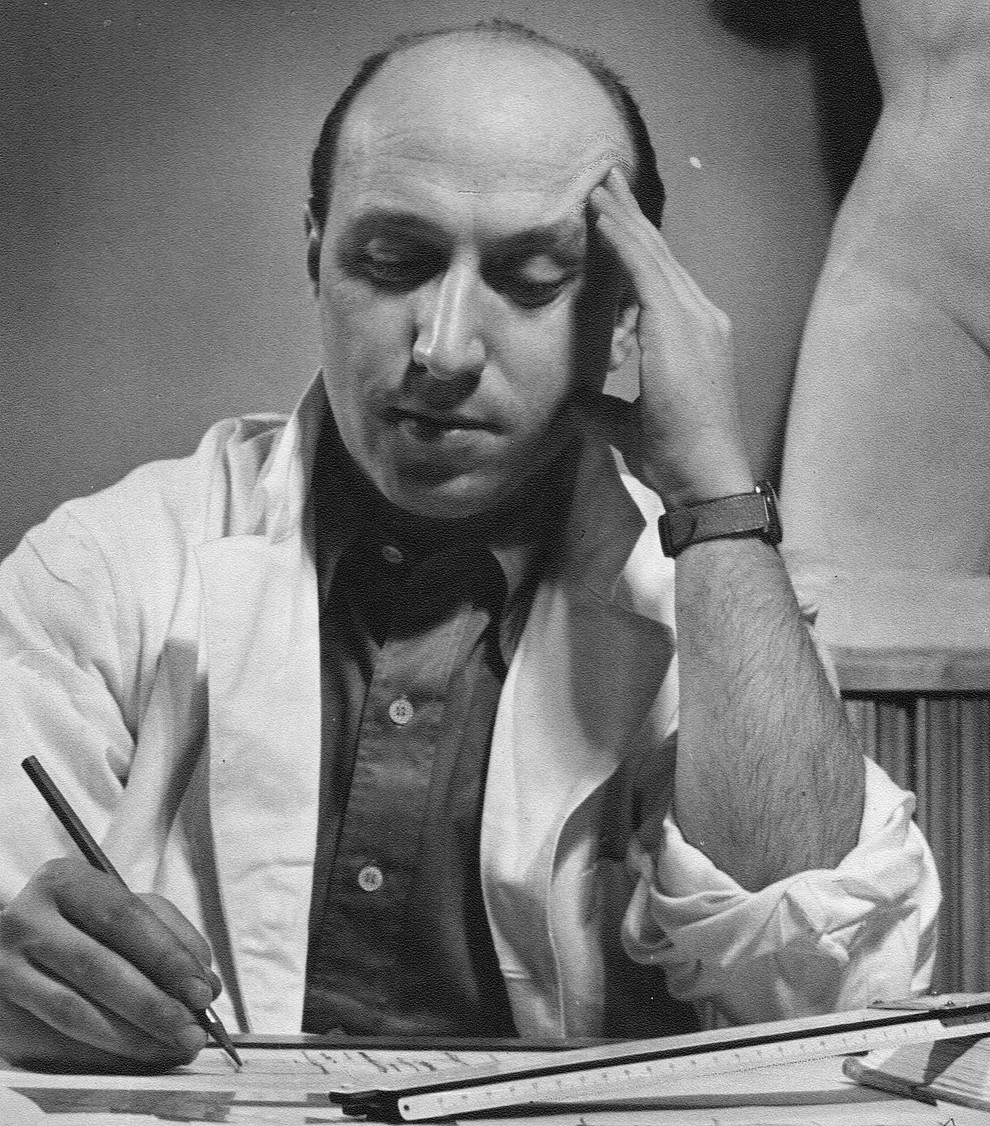 Arkitekt Georg Varhelyi